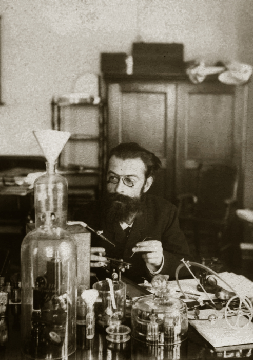 Сербский, Владимир Петрович